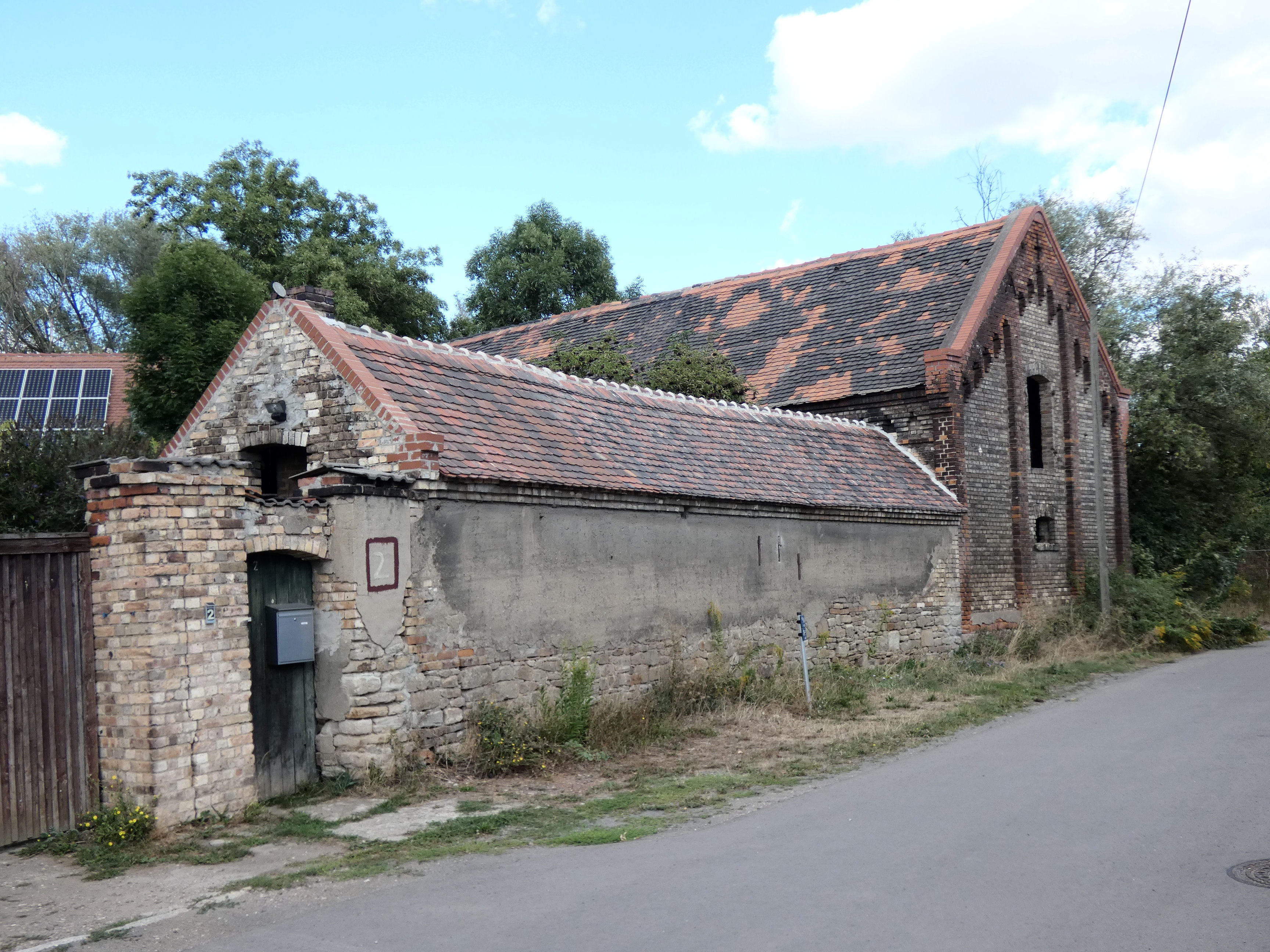 Auestraße 2, Radewell-Burg, Halle (Saale), Bauernhof